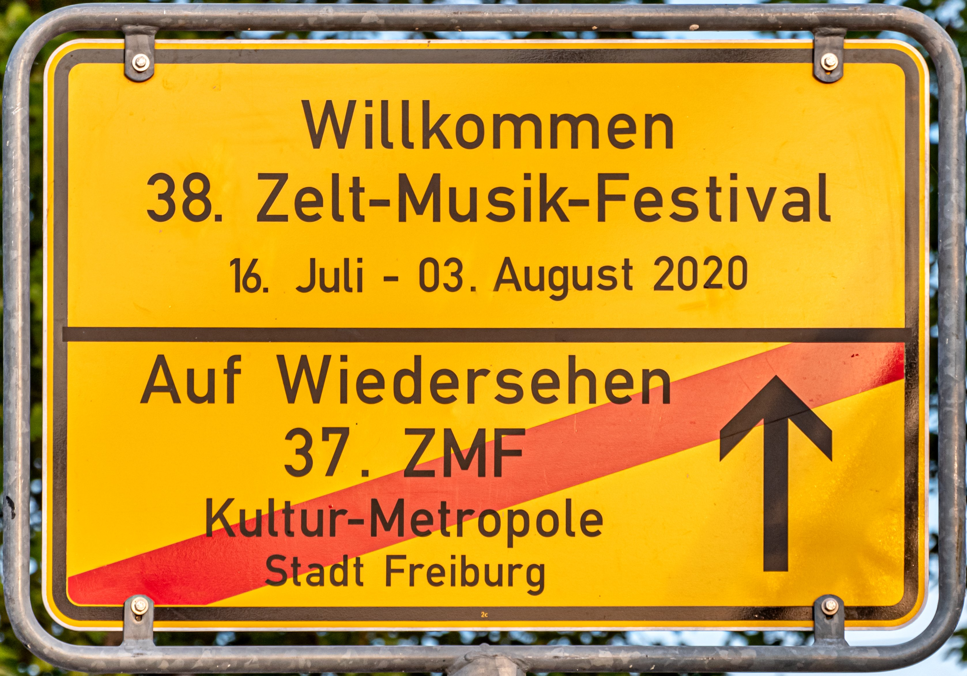 Bilder vom Zelt Musik Festival 2019 in Freiburg im Breisgau Die Eröffnung des Festivals am 17.07.2019